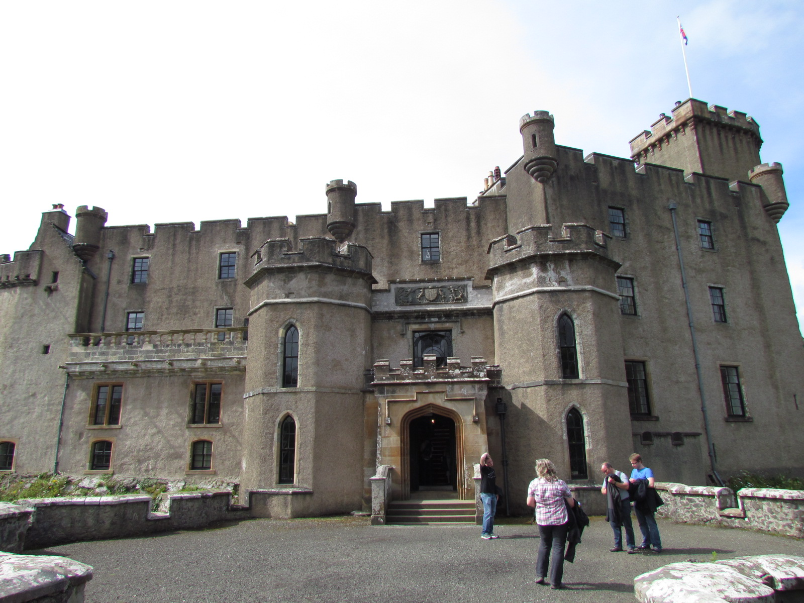 Dunvegan Castle, das Schloss der MacLeods auf der Ilse of Skye (Schottland)